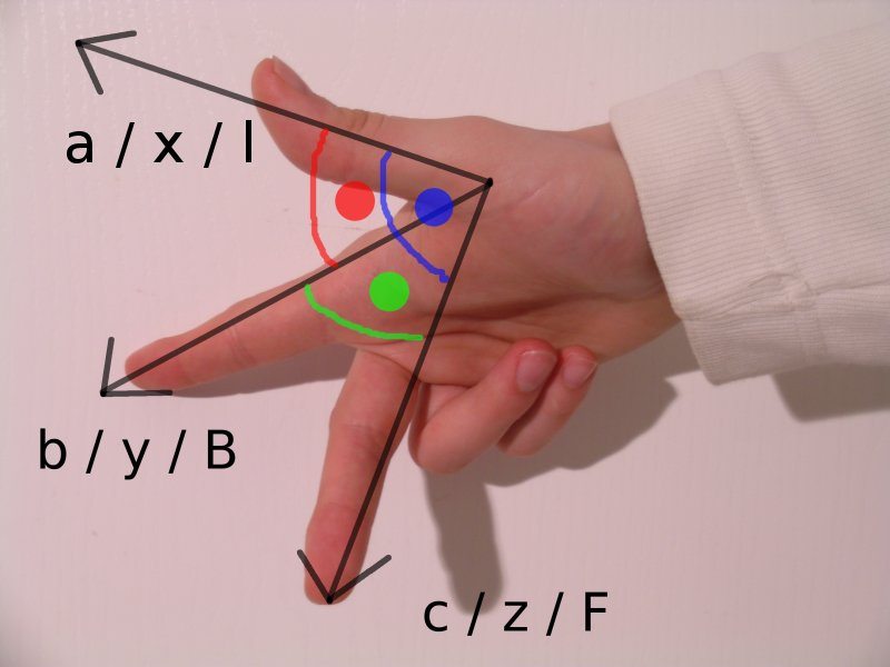 Rechte Hand, die die Rechte-Hand-Regel erklärt. a,b,c / x,y,z sind Vektoren, l,B,F stehen für die Formel F → = i ( l → × B → ) {\displaystyle {\vec {F =i({\vec {l \times {\vec {B )} . F ist hierbei die Lorentzkraft, die auf einen stromdurchflossenen Leiter l ausgeübt wird, wenn auf ihn ein B-Feld einwirkt. Der Daumen zeigt in Richtung der Ursache (technische Stromrichtung I bzw. Bewegungsrichtung der positiven Ladung q also von + nach -). Der Zeigefinger zeigt in Richtung der magnetischen Feldlinien, also der Vermittlung (B-Feld ) von Nord nach Süd. Der Mittelfinger entspricht der Wirkung (Kraft). Bei negativen bewegten Ladungen gilt dies analog, allerdings für die linke Hand.